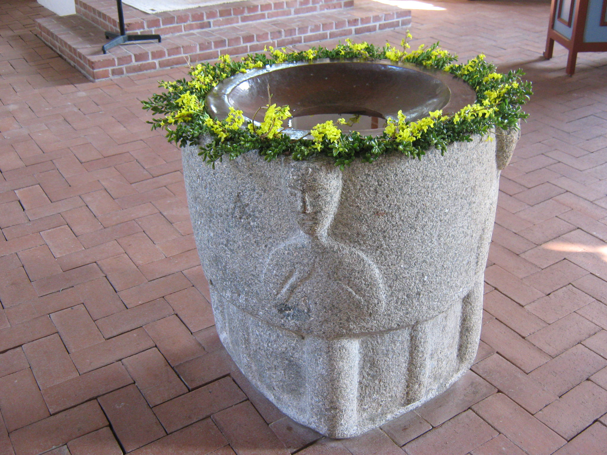 Taufe der Kirche in Dunum, Ostfriesland, Niedersachsen, Deutschland